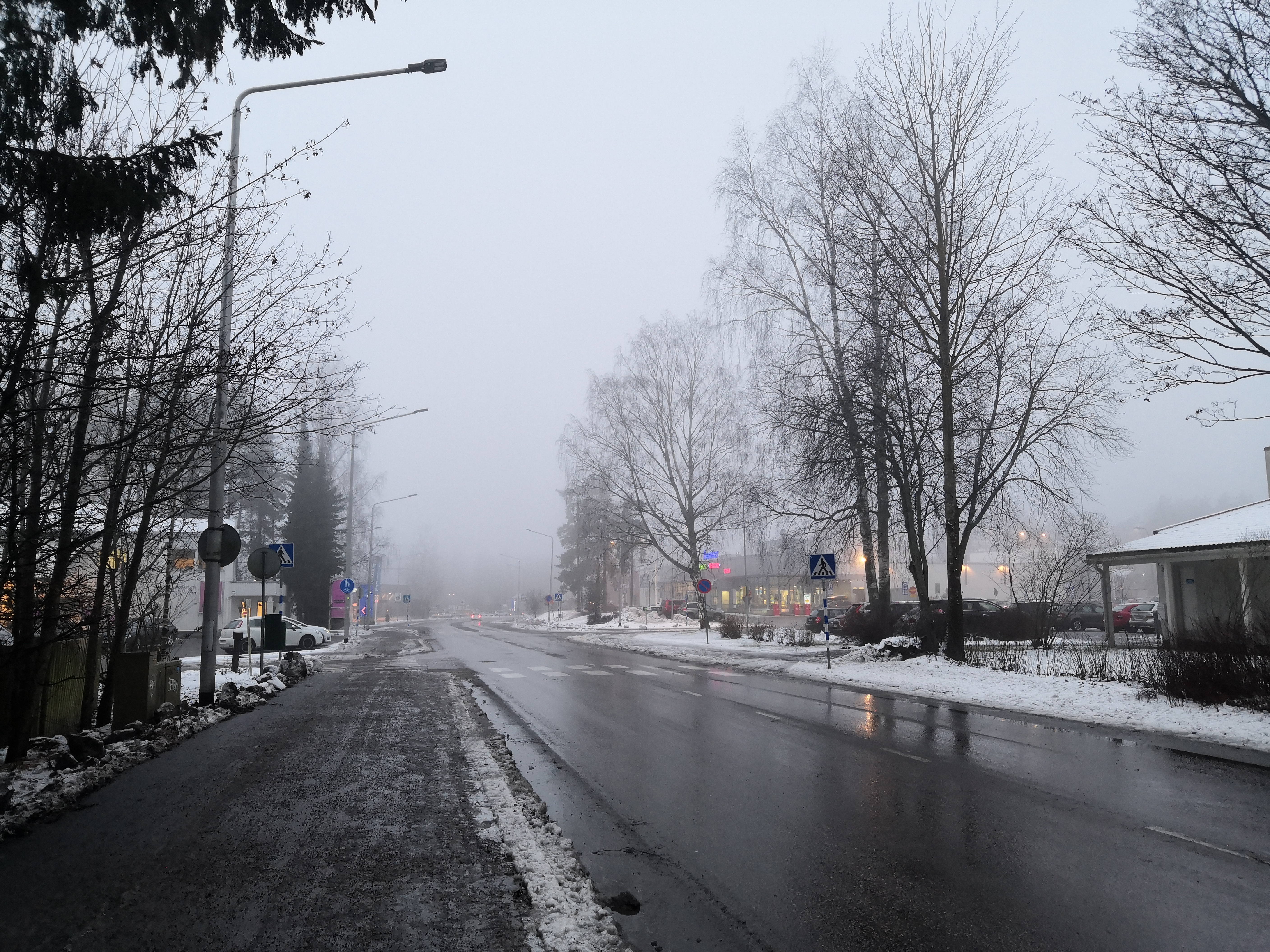 Utinkatu Kouvolan Tornionmäessä sumuisella säällä